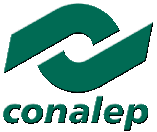 Escudo del Colegio Nacional de Educación Profesional Técnica (Conalep)